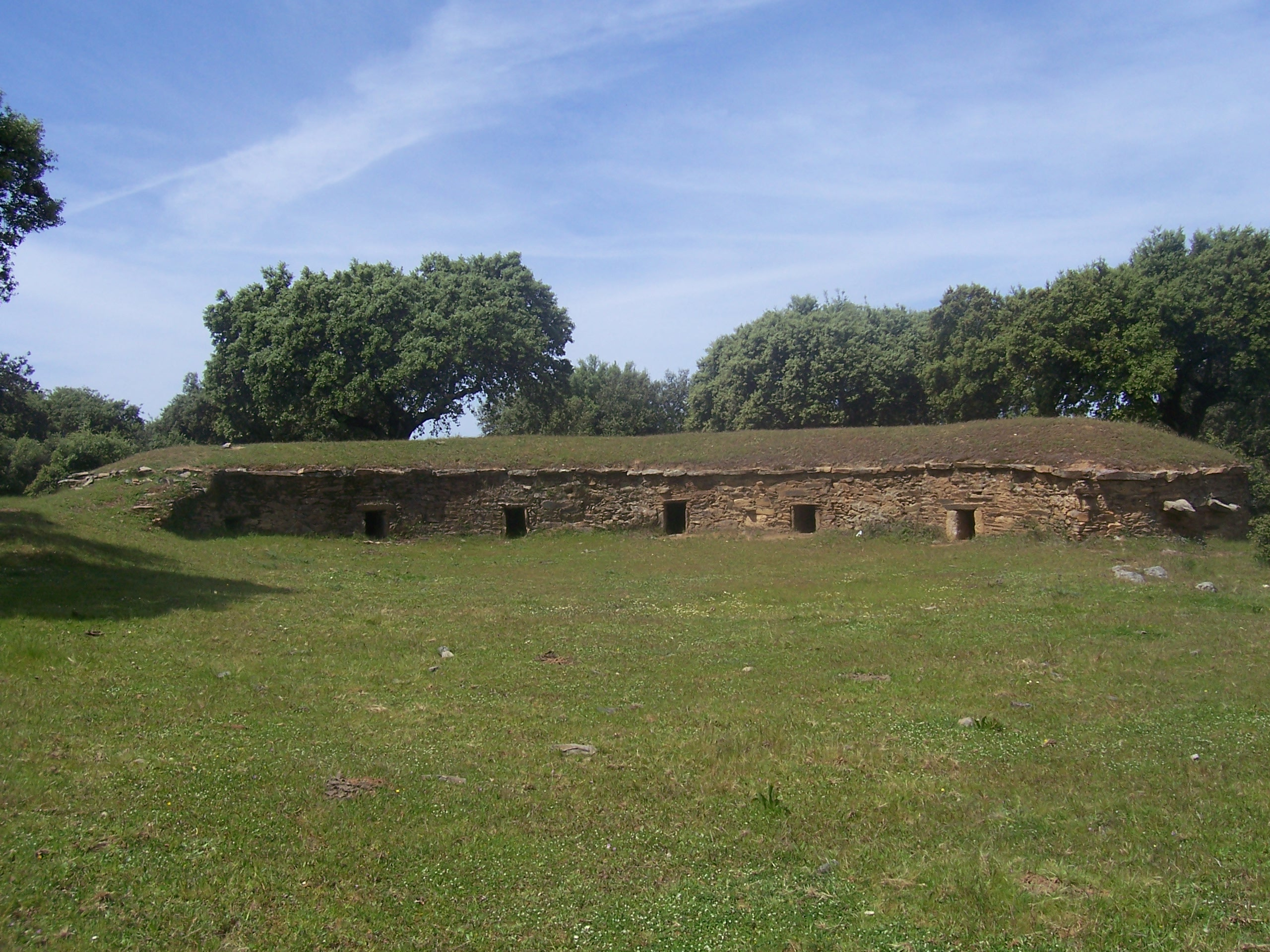 Zahurda en la dehesa boyal de Montehermoso, Cáceres, España